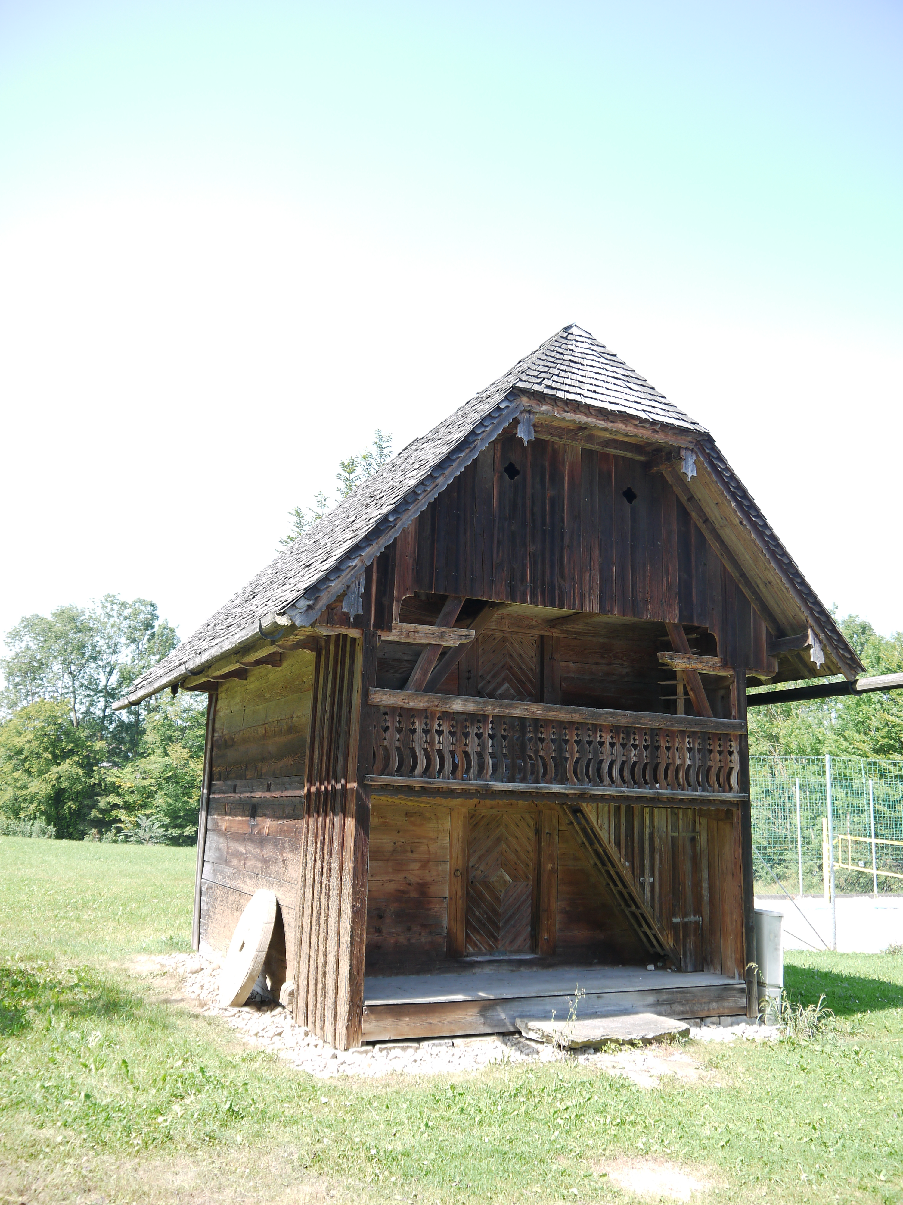 Getreidekasten in Aurach am Hongar.